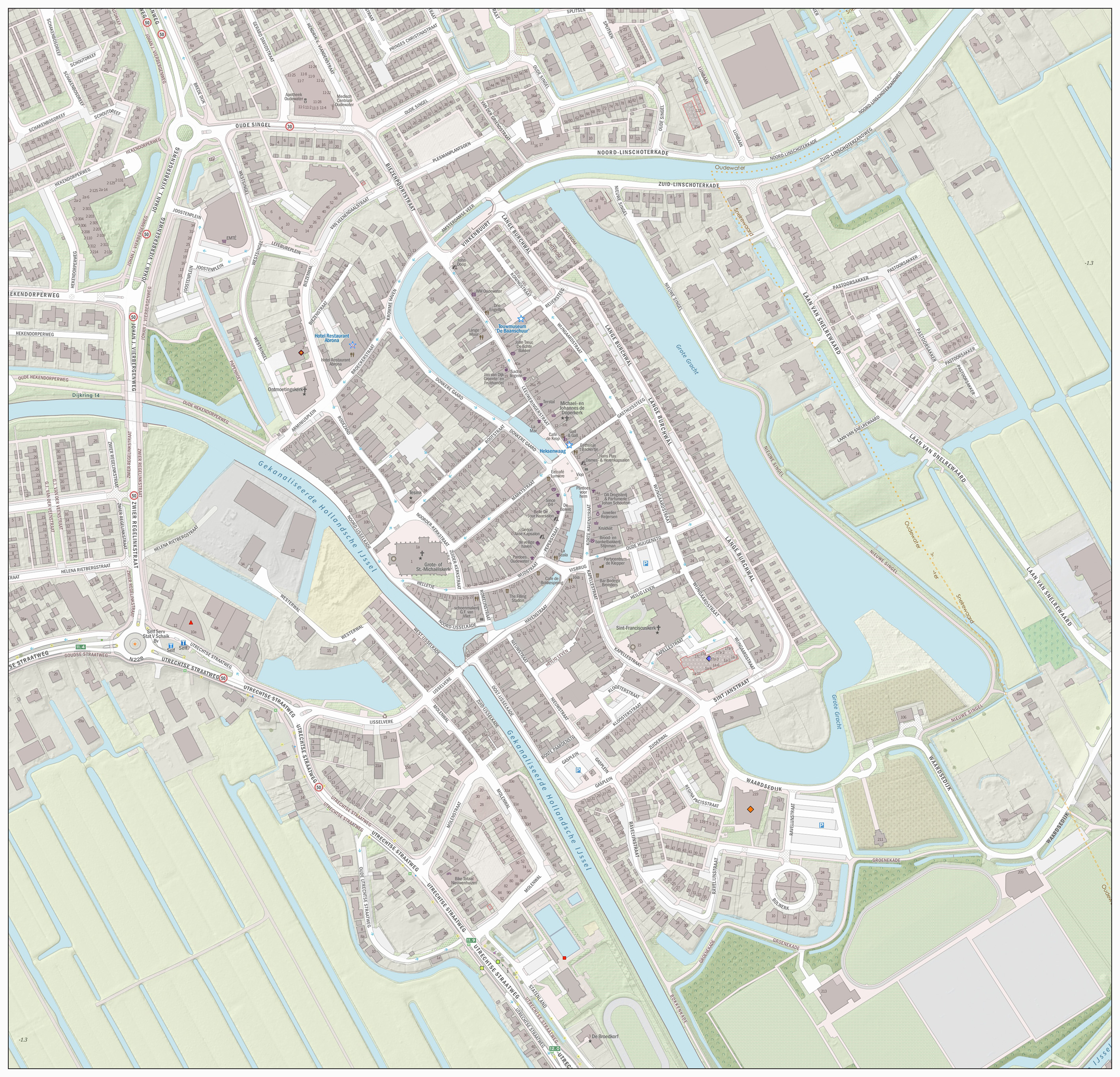 Topografische kaart van Oudewater (centrum van woonplaats). Resolutie: 2688 pixels/km. Kaartbeeld samengesteld uit de open geodata van de Basisregistratie Grootschalige Topografie (BGT), Creative Commons-BY Kadaster, en Top10NL en Top25namen (Basisregistratie Topografie, Kadaster), Creative Commons-BY Kadaster. Gebouwvlakken uit open geodata BAG extract, Creative Commons-BY Kadaster. Wegen uit de OpenStreetMap, CC-BY OpenStreetMap bijdragers. Reliëfschaduw uit de Actuele Hoogtekaart AHN2/AHN3. Samenstelling en kleurenschema: Jan-Willem van Aalst, met QGIS2. Zie ook de Legenda.